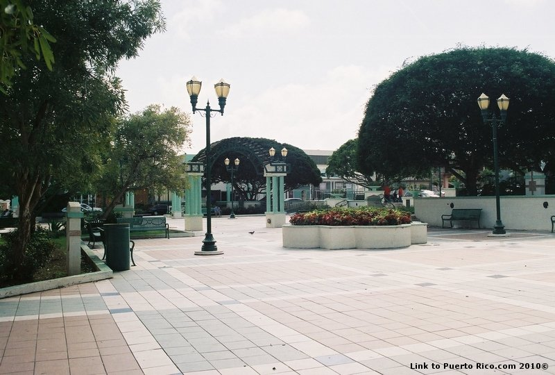 Plaza de recreo, Aibonito, Puerto Rico